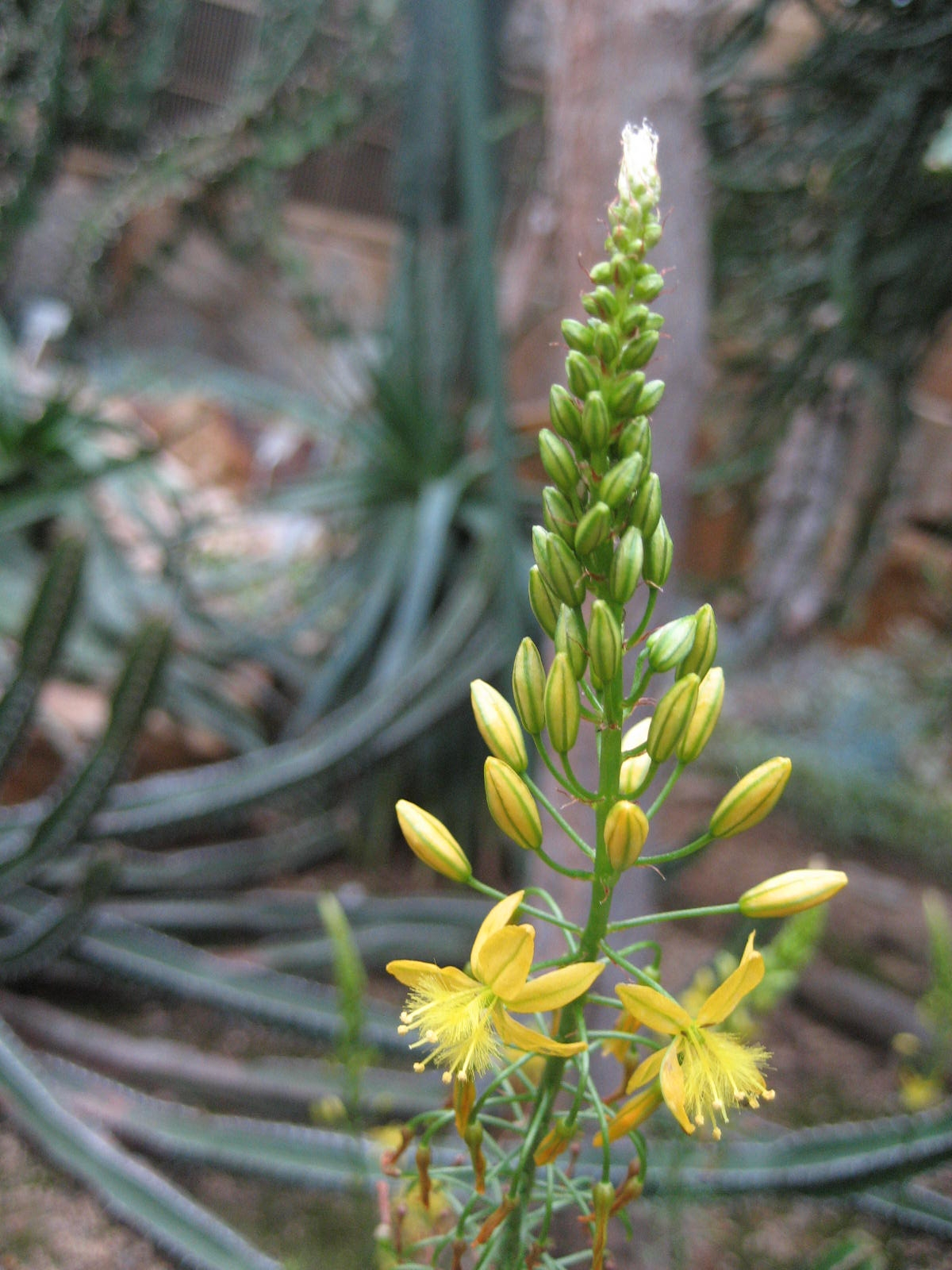 Bulbine alooides - Blüte - Bot. Garten Berlin Dahlem